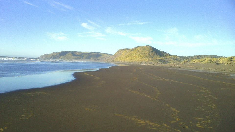 playa tirua